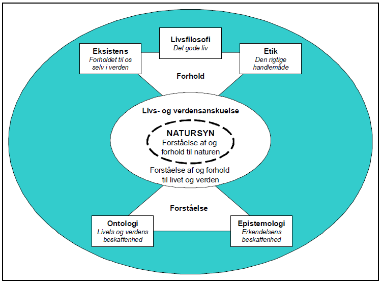 Figur 7 i Christensen, J. (2008). Hvad er et natursyn? Refleksioner over natursyn som begreb. Aalborg; Institut for Samfundsudvikling og Planlægning, Aalborg Universitet.